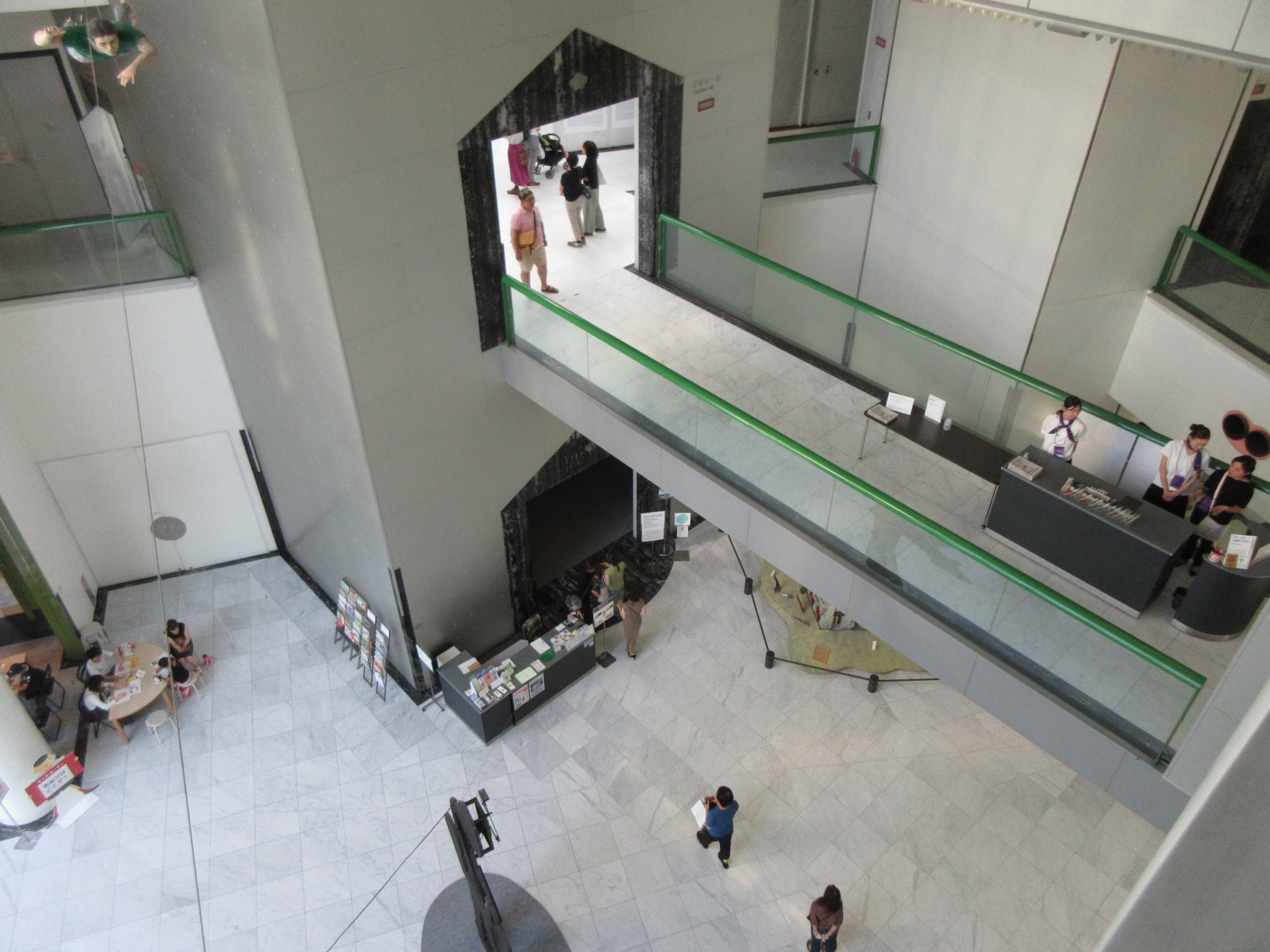 名古屋市美術館の屋内